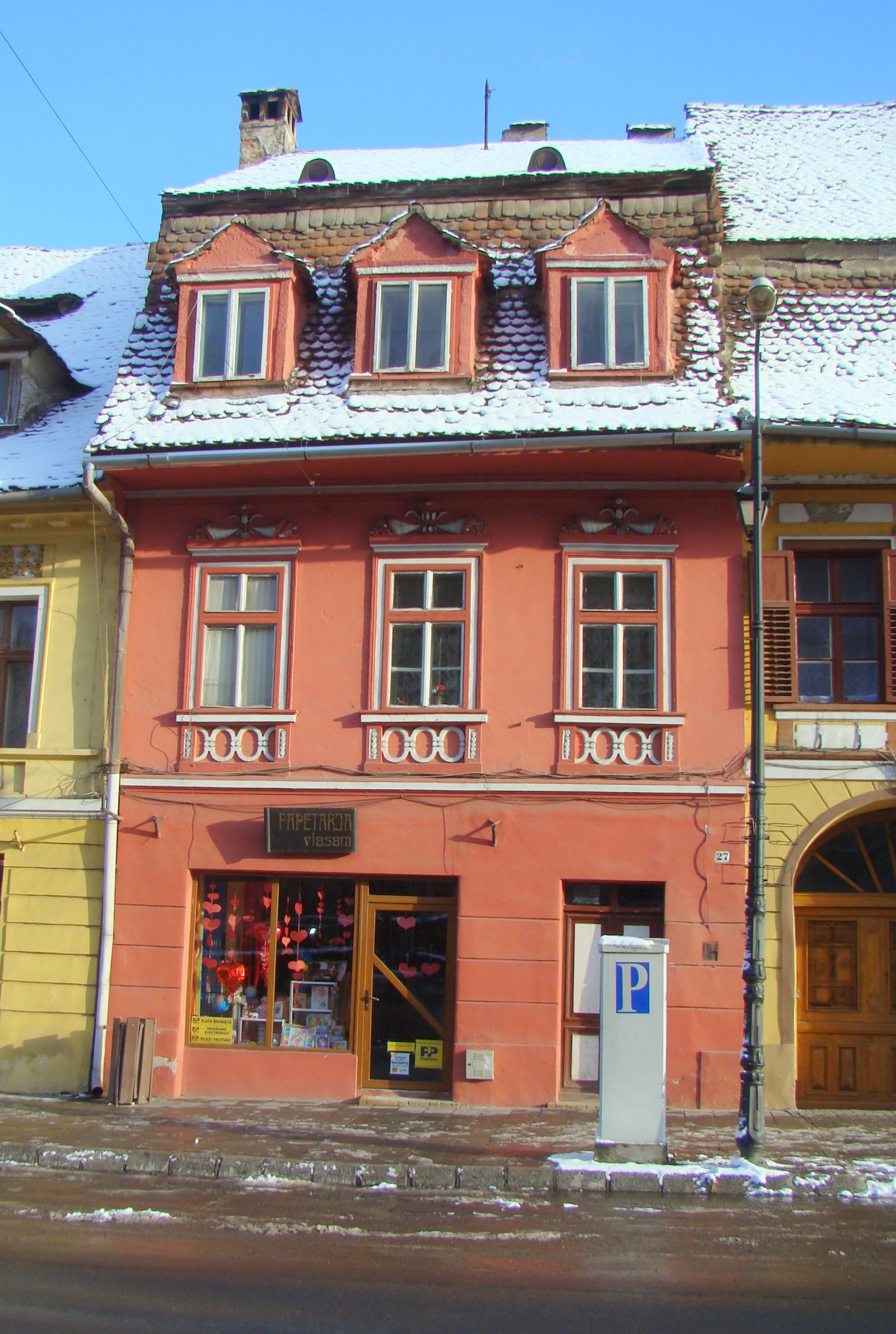 Casă, municipiul Sighișoara, Piața Oberth Hermann 27 înc. sec. XIX